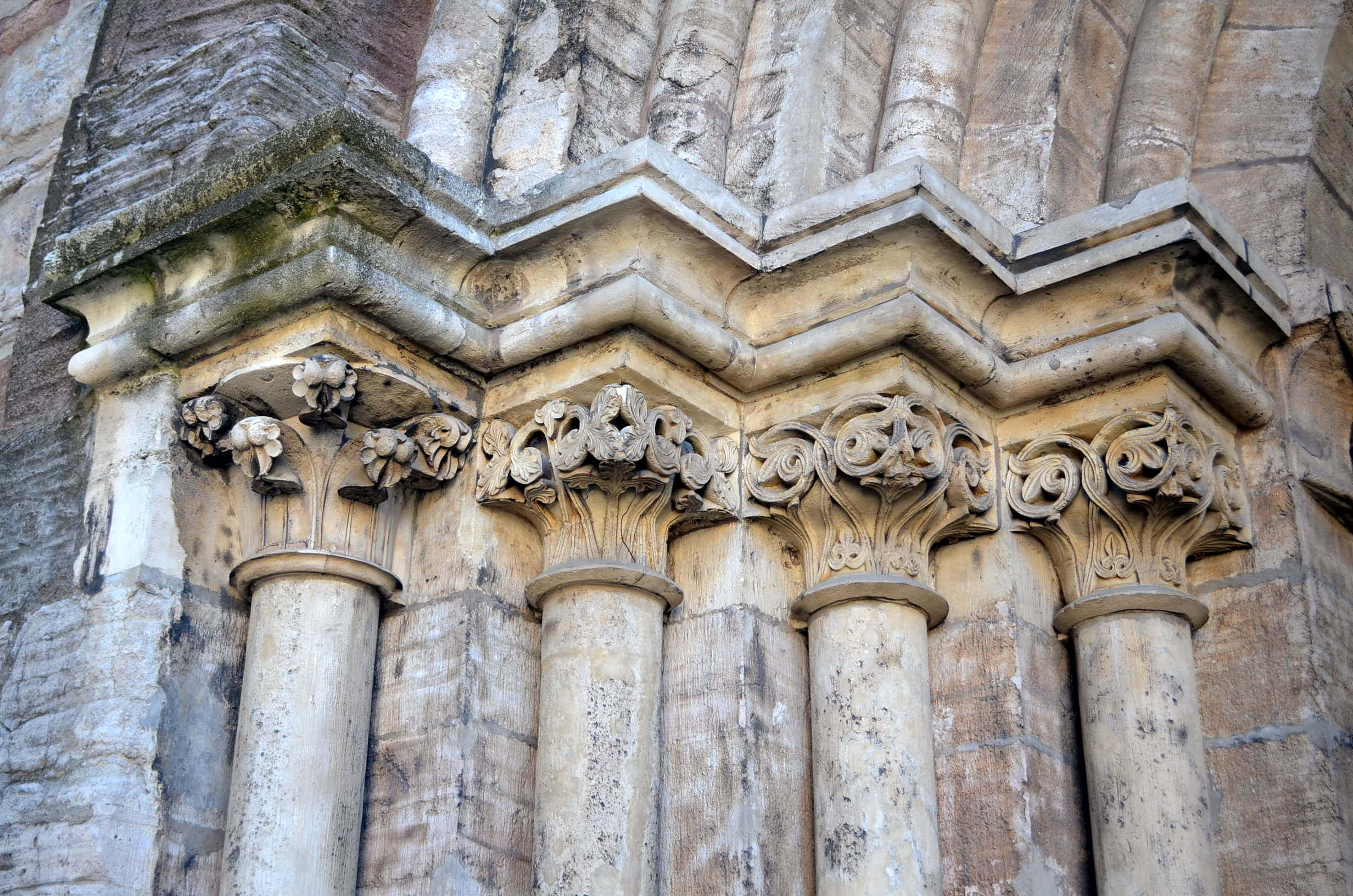 Braunschweig, Magnikirche: Kapitelle am Westportal